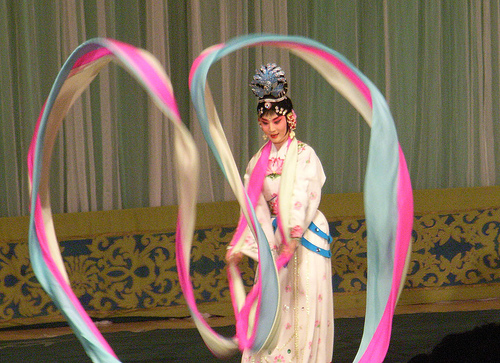 京剧天女散花